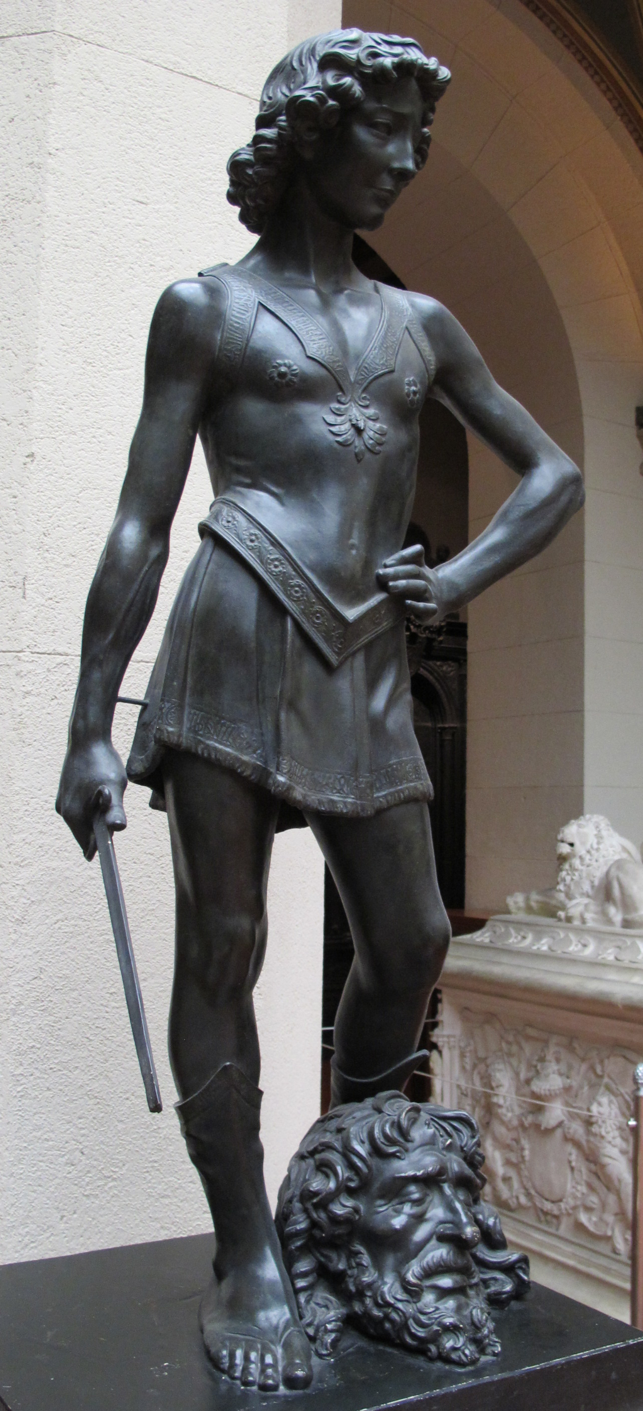 Museo pushkin, calchi, verrocchio, david